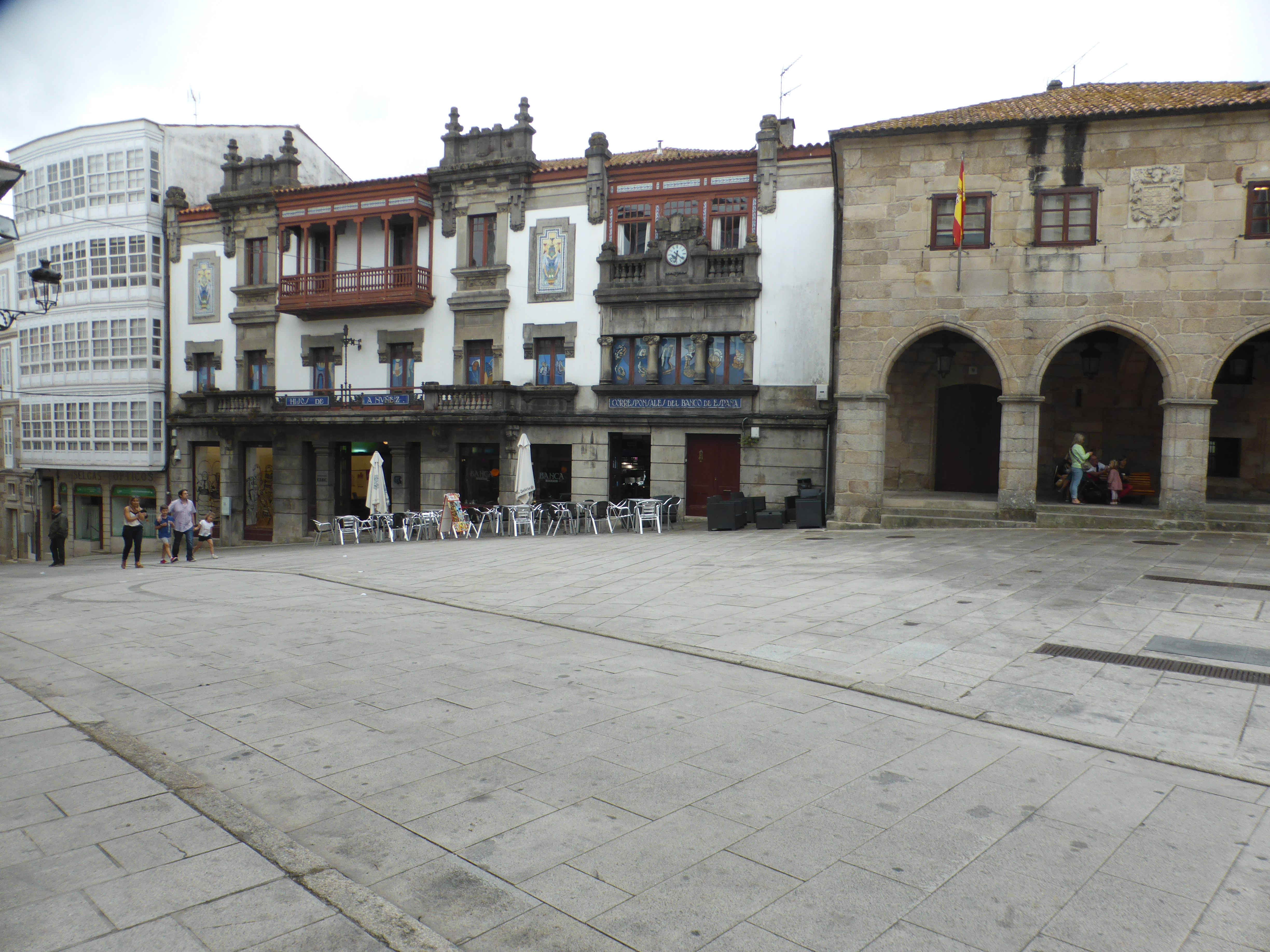 La Casa Núñez es sede de la Fundación Centro Internacional de la Estampa Contemporánea (CIEC), donde se realizan talleres de grabado, de diferentes técnicas (xilografía, litografía,...). Es también Museo de la Estampa Contemporánea.